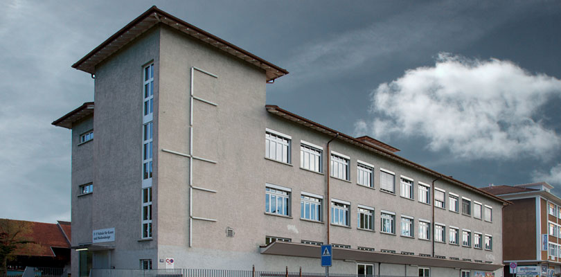 F+F